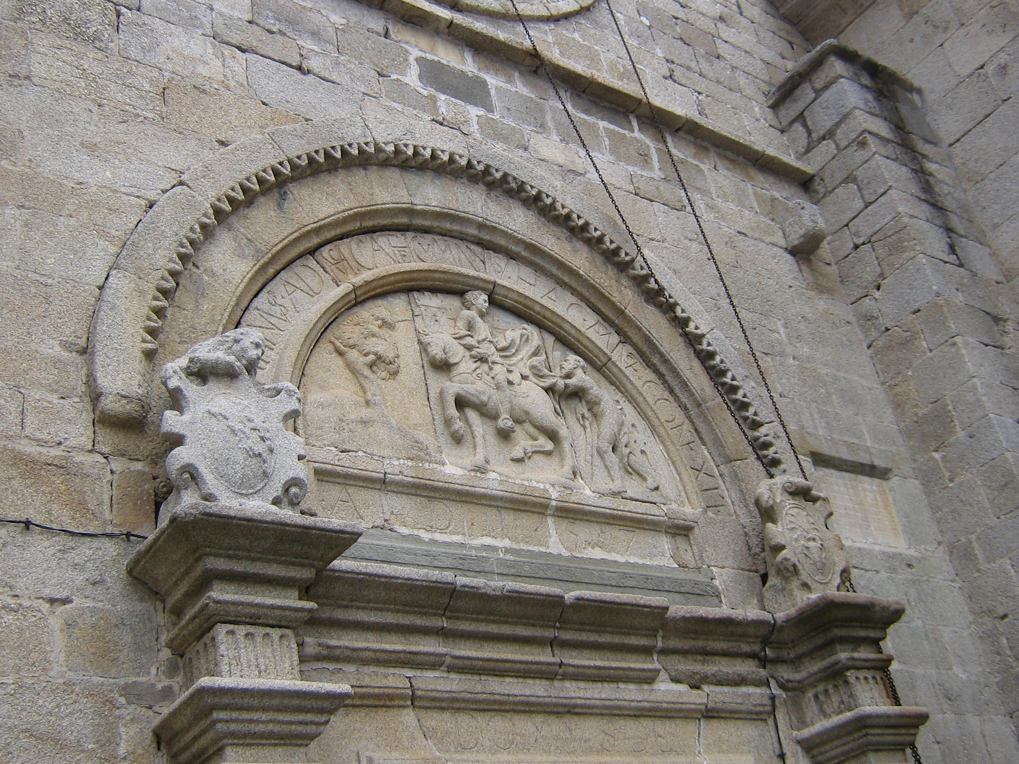 Haupttor des Klosters San Martín de Castañeda in Galende, Zamora, Spanien. Dargestellt ist der Namenspatron des Klosters, Martin von Tours (Sankt Martin), seinen Mantel teilend.